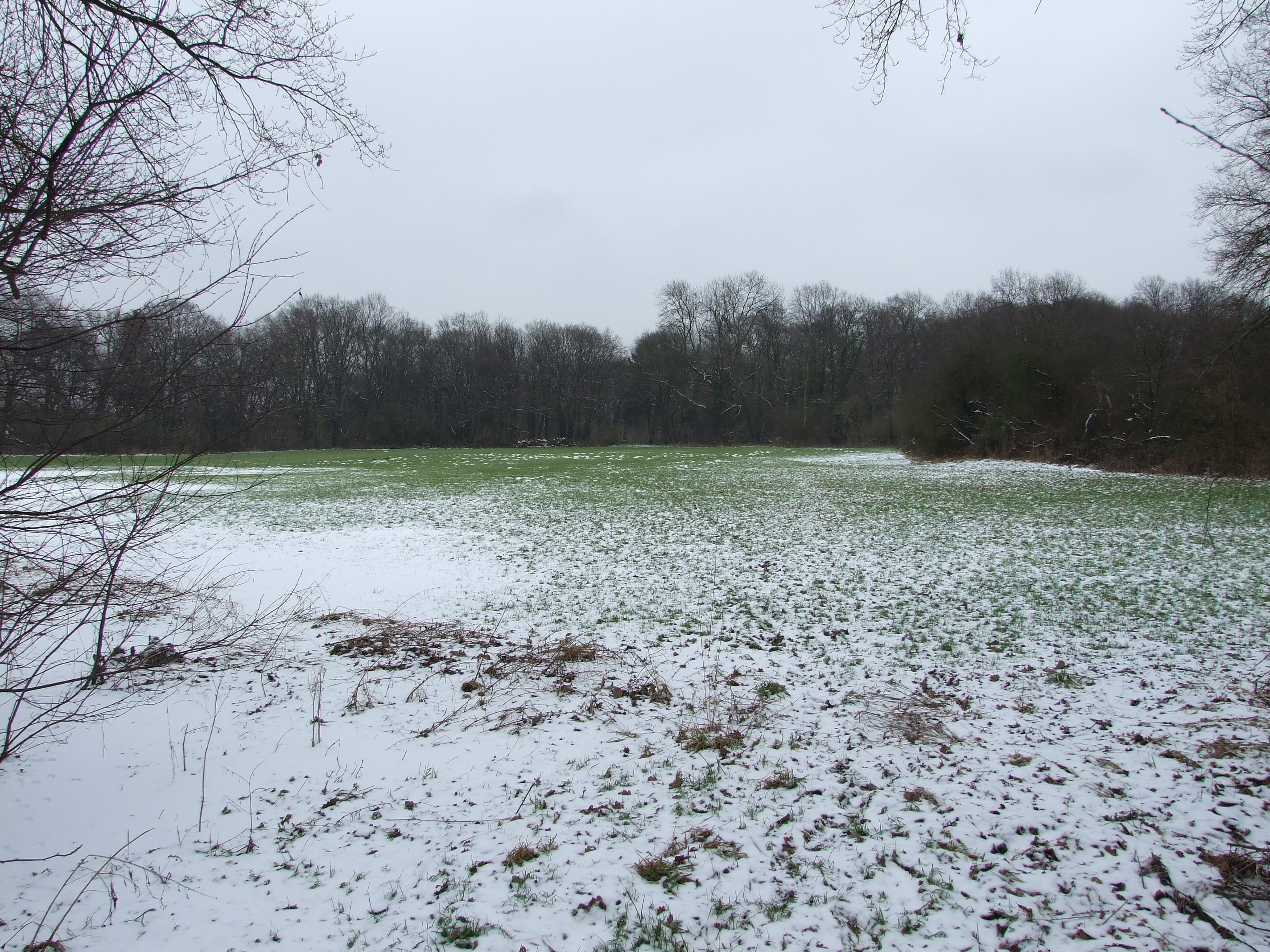 ehemaliger Standort des Lusthauses